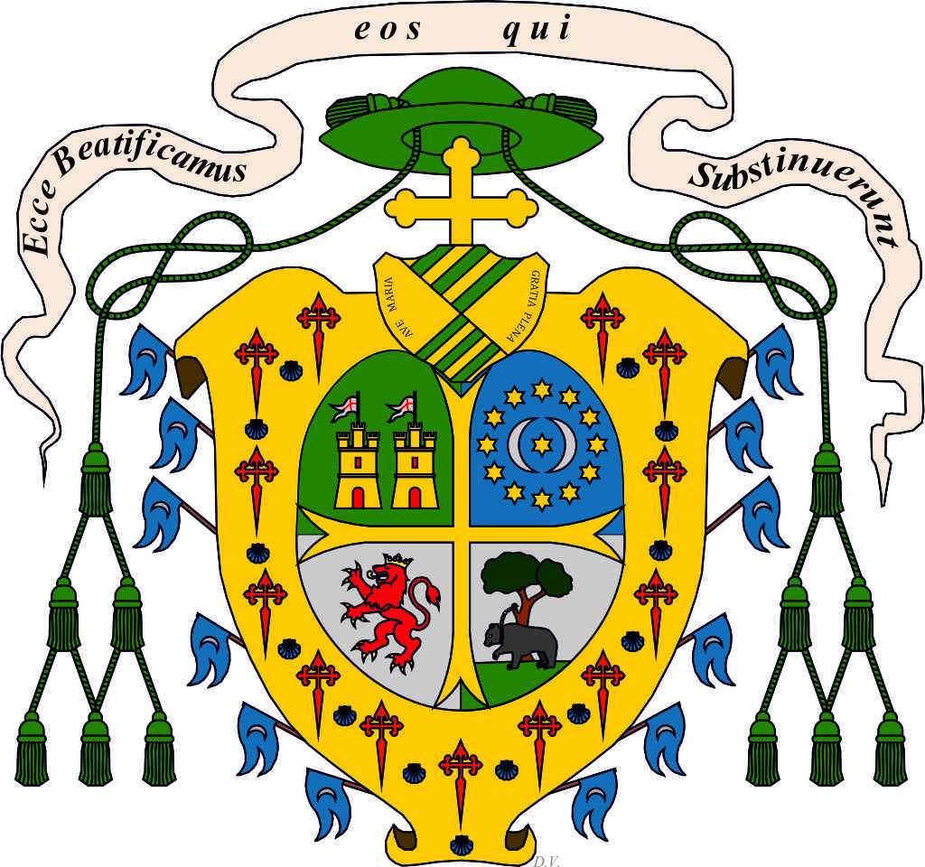 Escudo de José Antonio Sáenz de Santa María